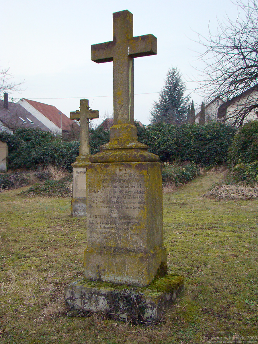 Grabmal für Freiherr Karl Reinhard von Gemmingen-Guttenberg (1797-1882) und seine zweite Gattin Hyppolythe geb. von Zeppelin (1831-1882) auf dem Friedhof in Bad Rappenau-Bonfeld